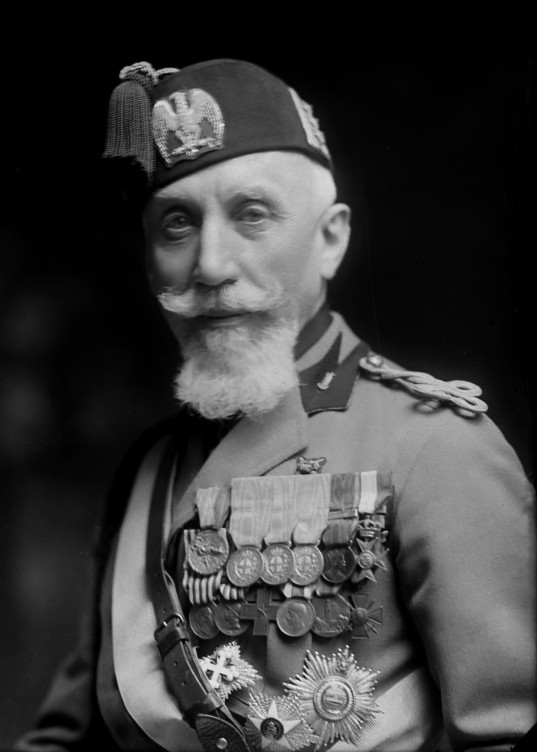 Emilio De Bono fotografato da Mario Nunes Vais